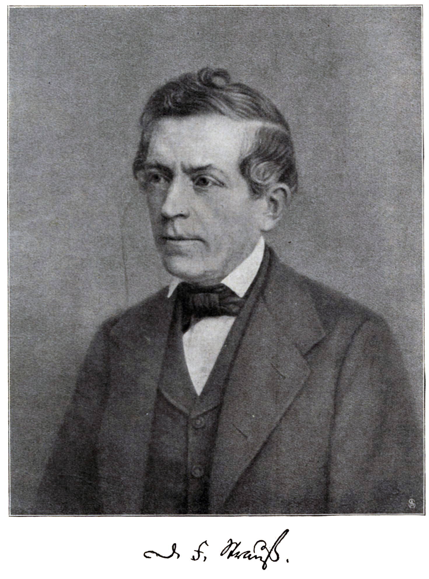 Bildnis und Unterschrift von David Friedrich Strauß